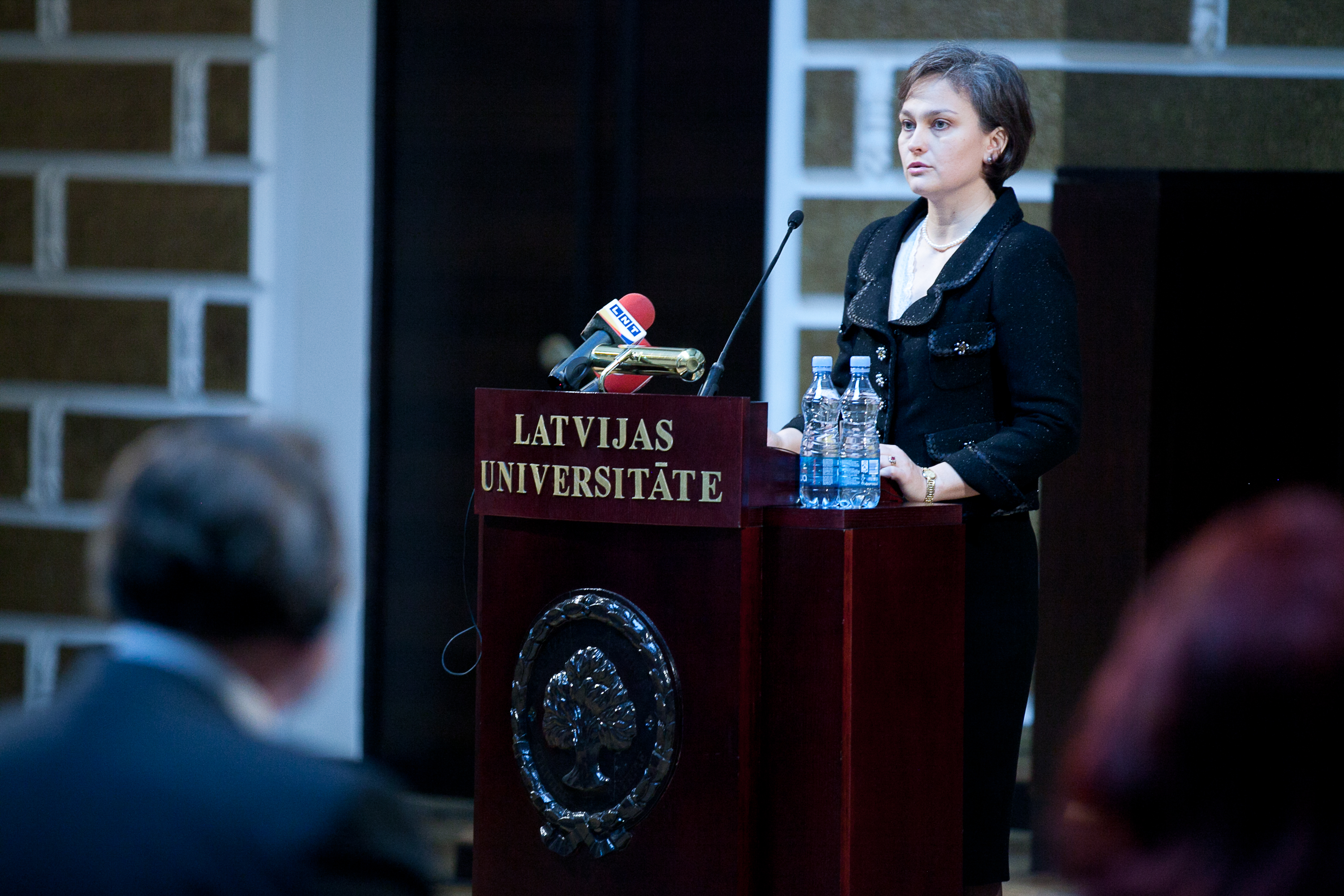 2012.gada 2.marts. Saeimas un Latvijas Universitātes rīkotā konference „Latvijas pilsonība 21. gadsimtā”. Attēlā Ineta Ziemele. Foto: Ernests Dinka, Saeimas Kanceleja